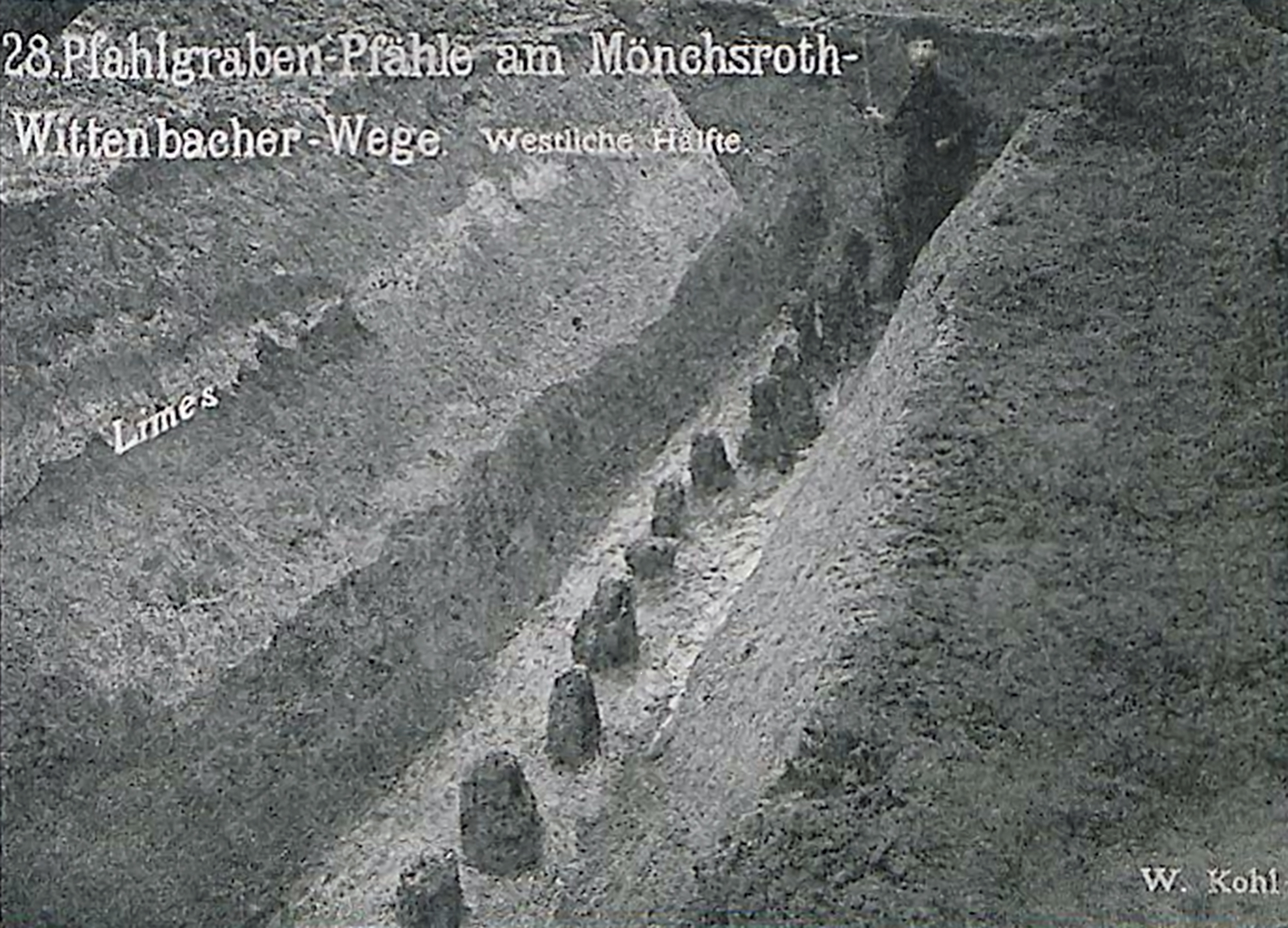 Grabungen an der rätischen Limespalisade im März 1894 durch denn RLK-Streckenkommissar Wilhelm Kohl.